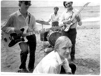 Группа "Скифы". Студенческий лагерь МГУ в Пицунде, 1968 год. Снимок сделан на фотоаппарат с помощью таймера.